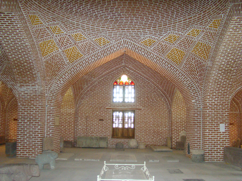 agalar